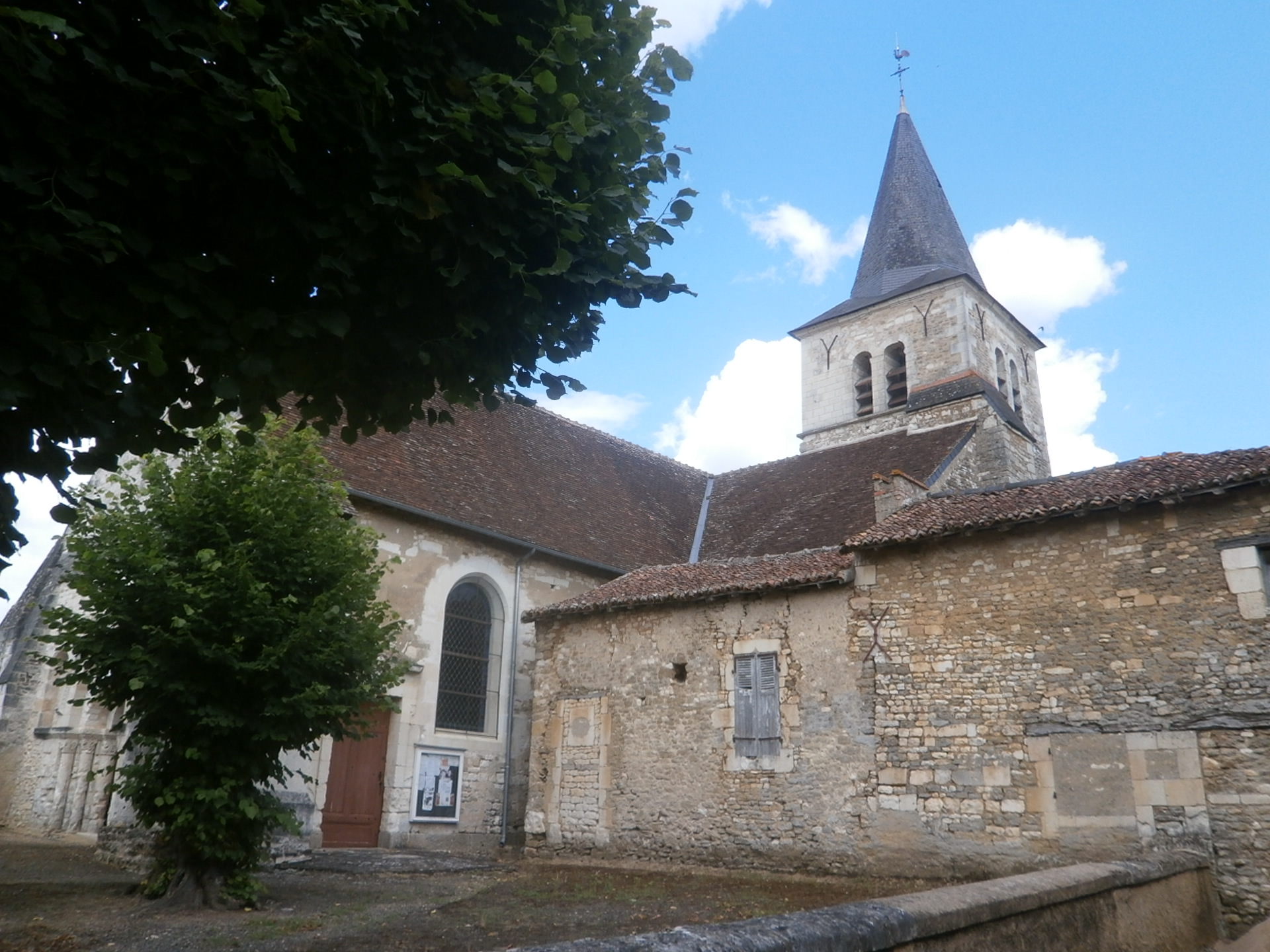 L'église de Braye-sous-Faye